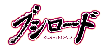 Wordmark of Bushiroad (in katakana)